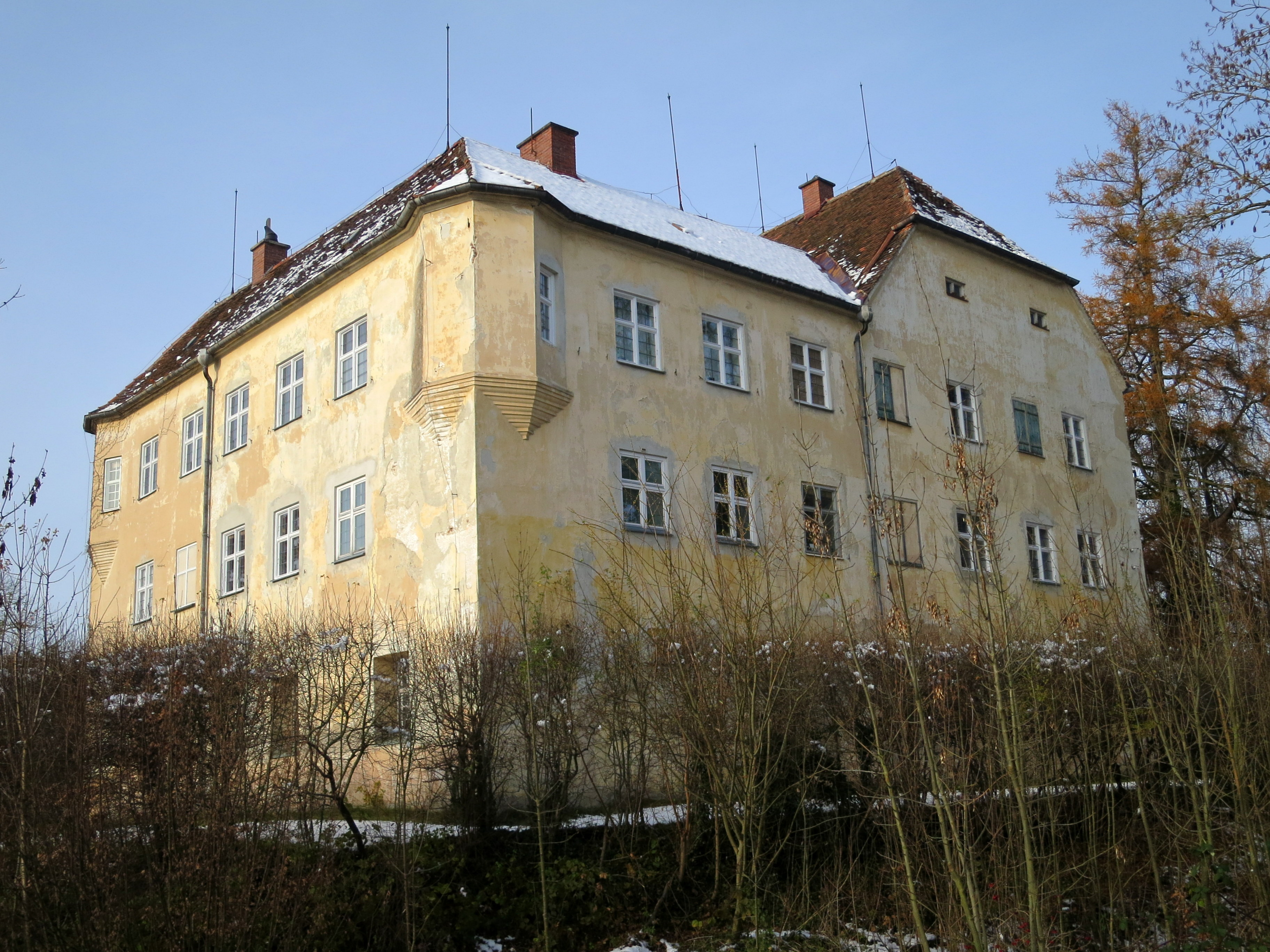 Schrägansicht des Schlosses